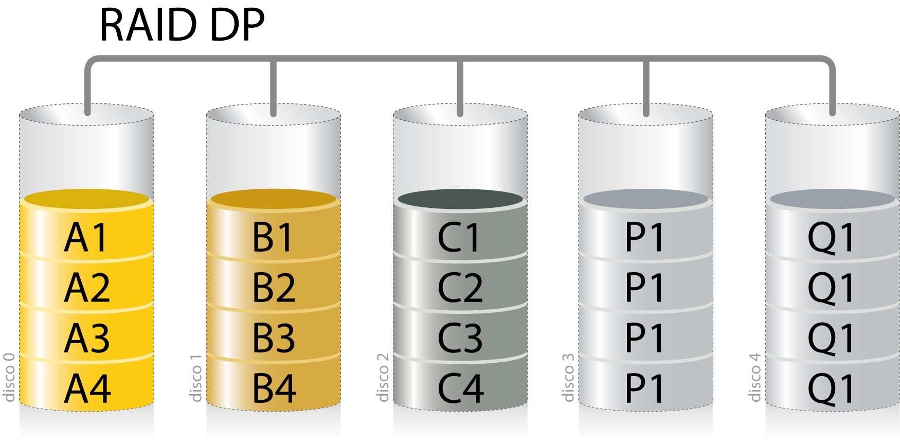 Esquema RAID DP